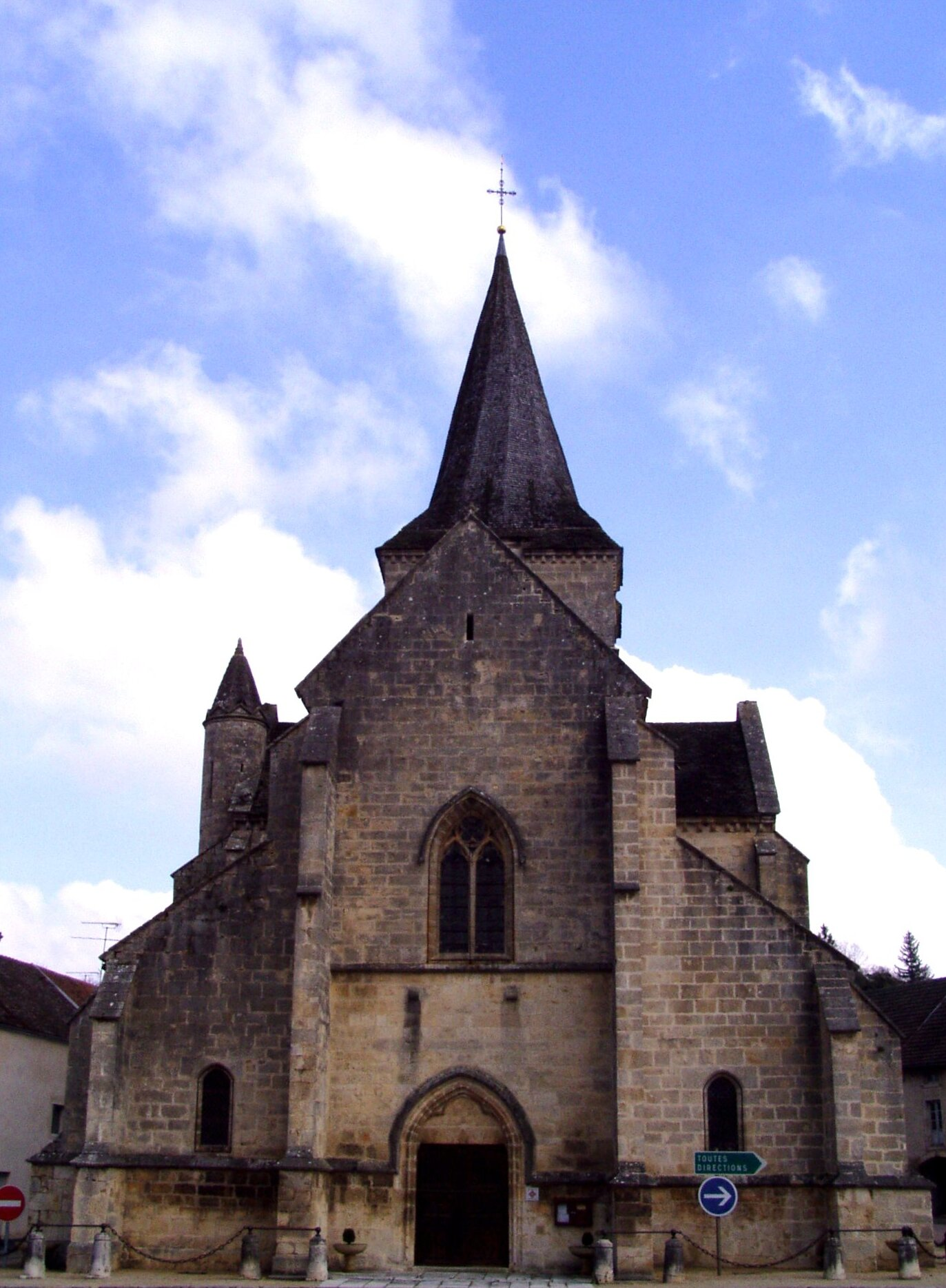 Eglise d'Aignay-le-Duc en Côte-d'Or